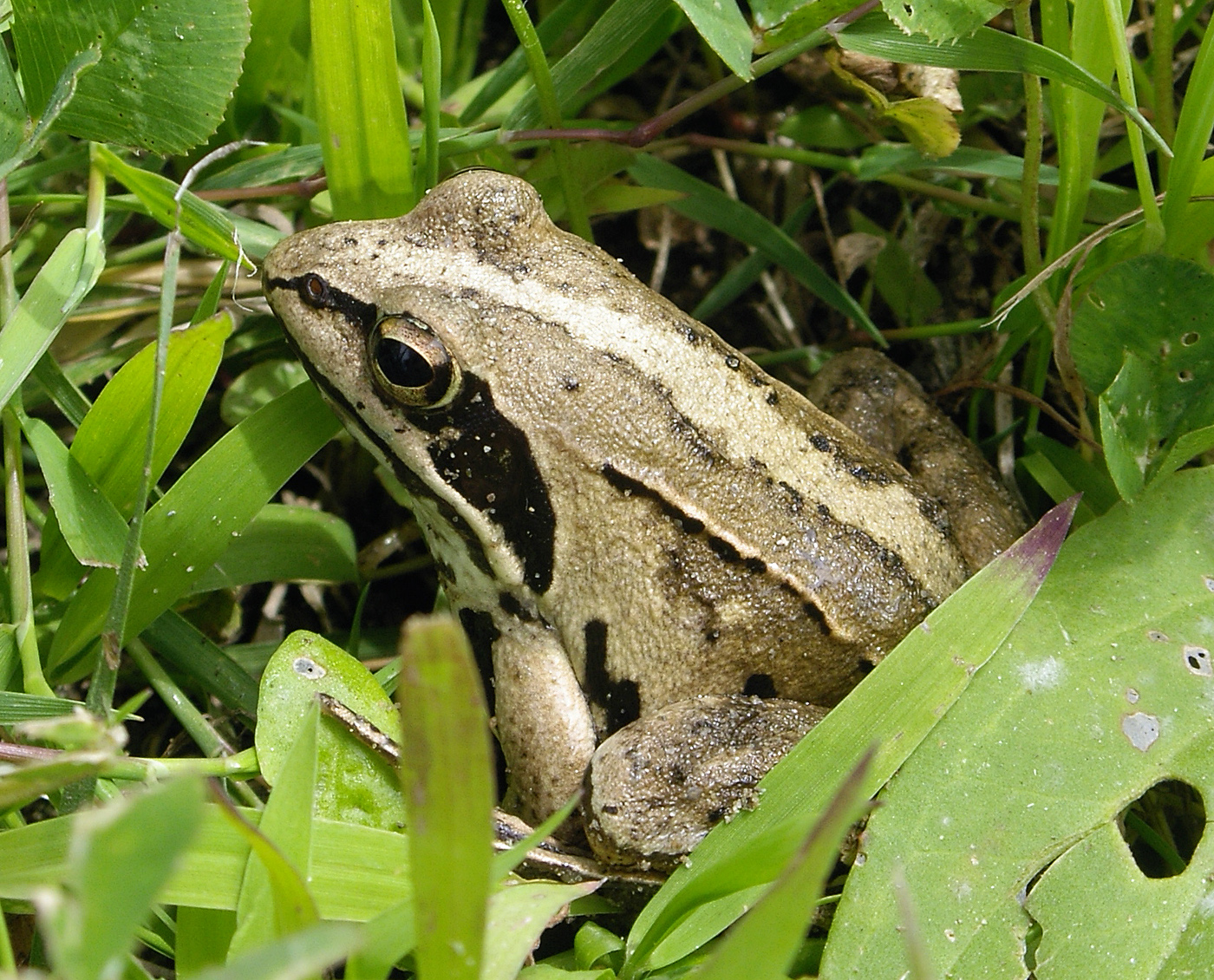 Béka a Tisza partján, Kiskörénél